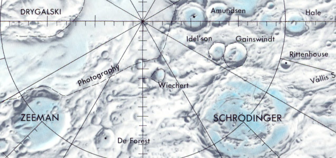 Cráter lunar Wiechert. Localización. (Lunar Chart LPC1. Second Edition)